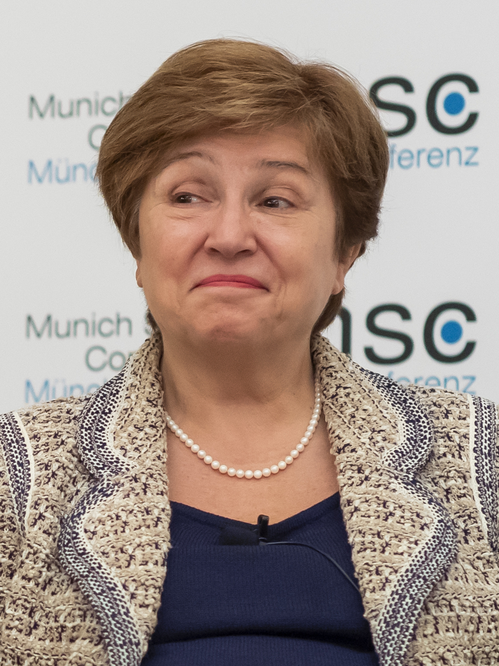 Kristalina Georgieva während der Münchener Sicherheitskonferenz 2019